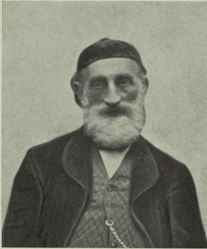 נתן במברגר. דף אשר נתלש מתוך החוברת: Distrikts-Rabbiner Nathan Bamberger : ein Büchlein schmerzvoller Erinnerung / herausgegeben von Freunden und Verehrern אשר יצאה לאור בעיר וירצבורג בשנת 1919, ובו דיוקן הרב נתן במברגר